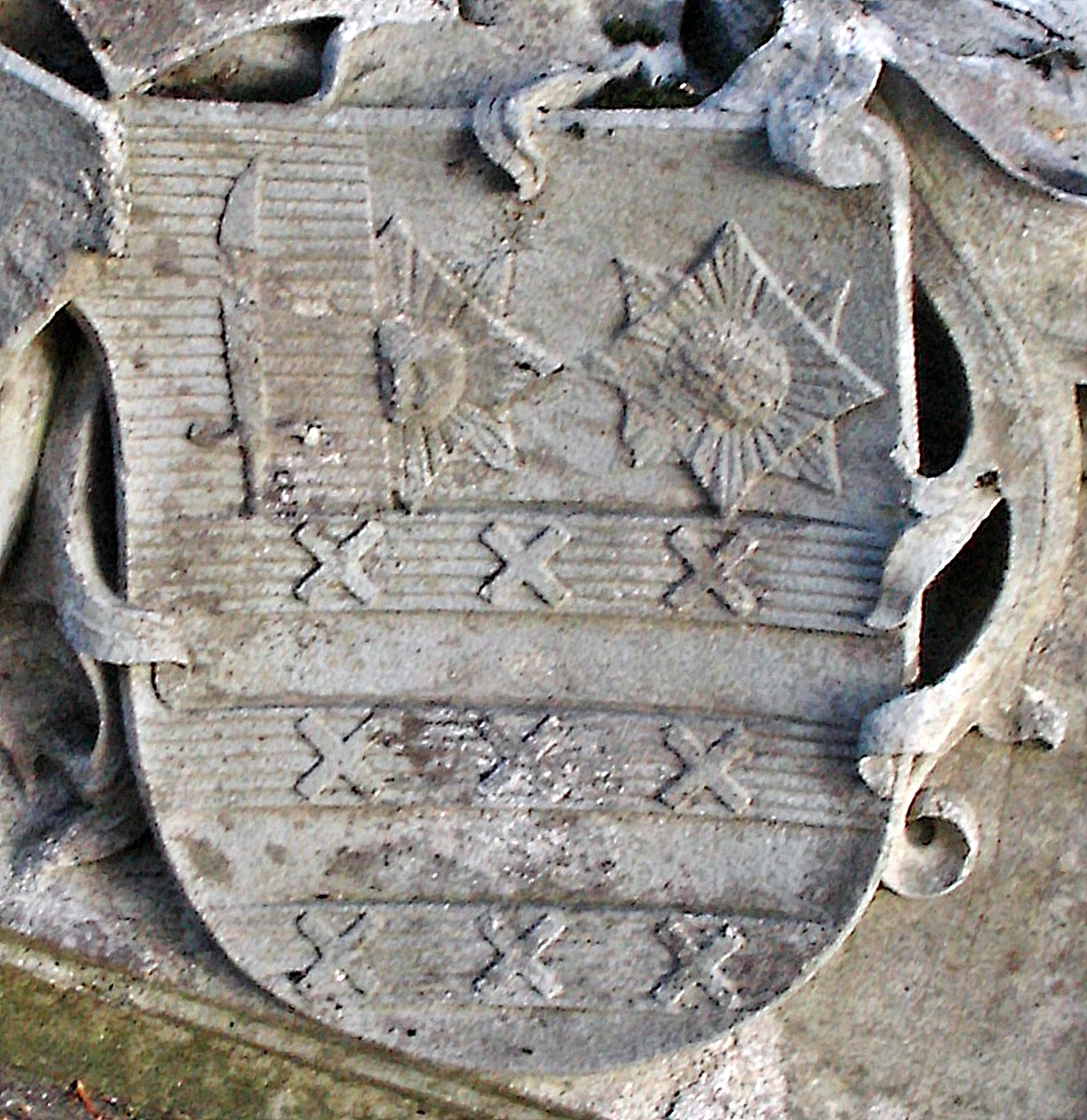 Familienwappen "de Tascher de La Pagerie" vom Grab der Gräfin Louise Cécile Rose Elisabeth Sophie de Tascher de La Pagerie, verheiratete Waldner von Freundstein (1818–1890), Hauptfriedhof Mannheim.